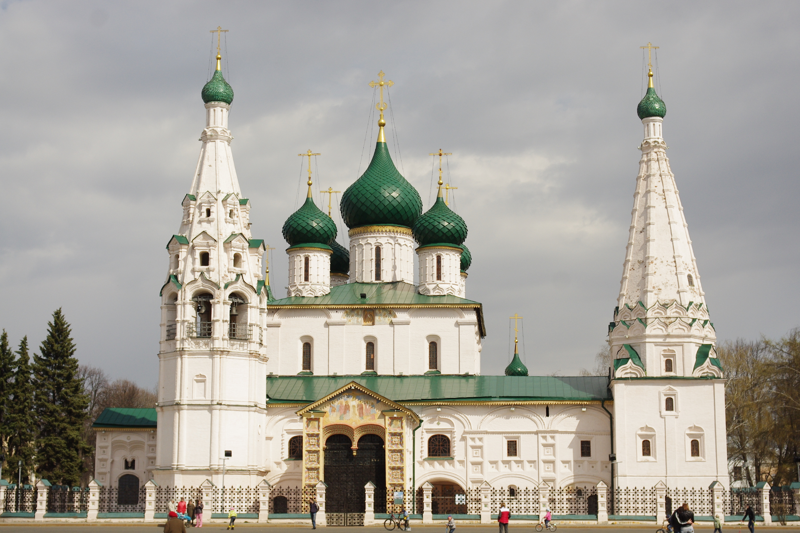 Ярославль, Советская площадь, д. 7